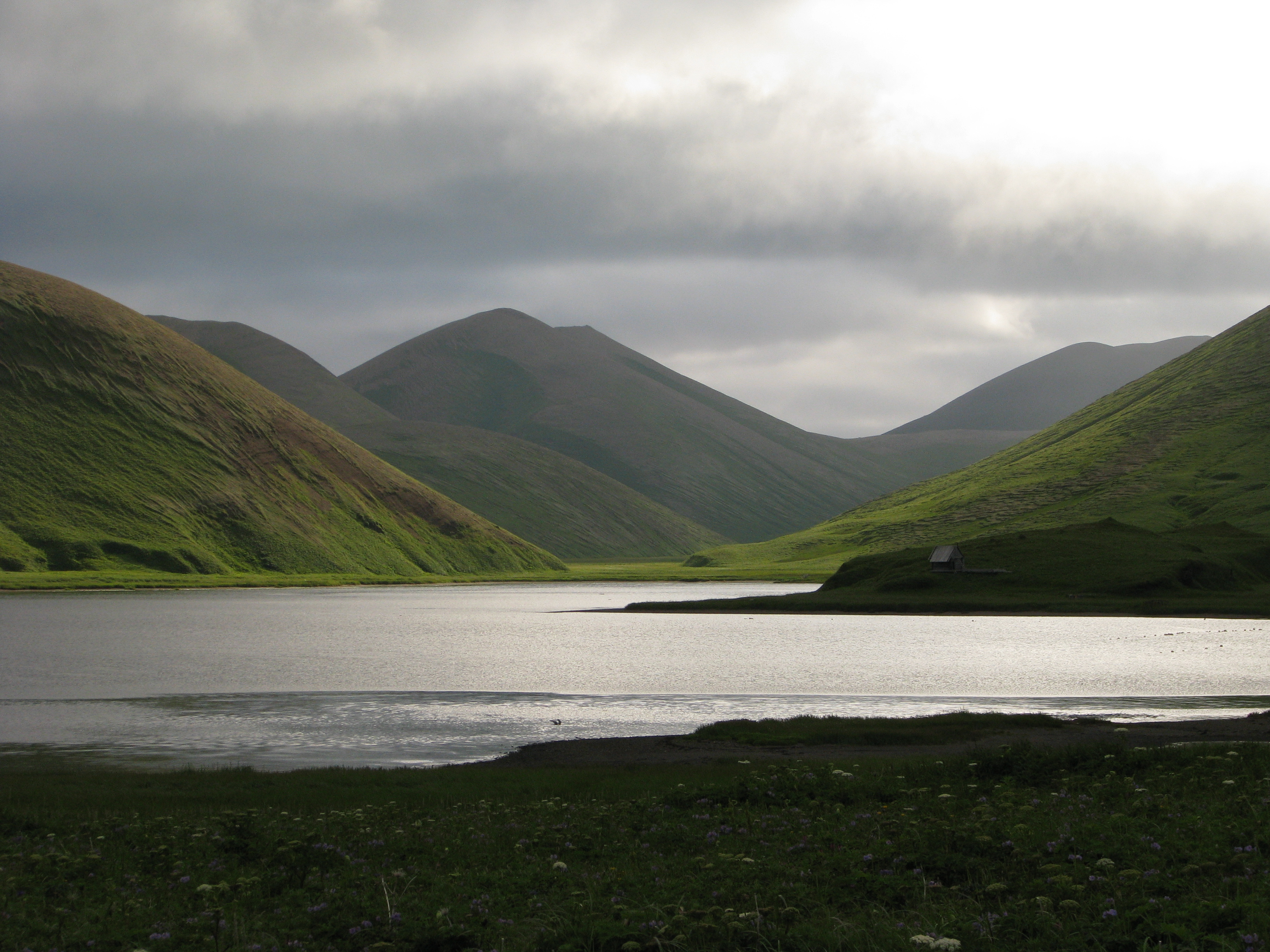 Командорский заповедник, Алеутский район, Медный остров, Гладковское озеро. This image is related to the protected area of Russia number 4100007